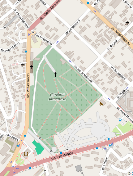 Cimitirul Central din Chișinău